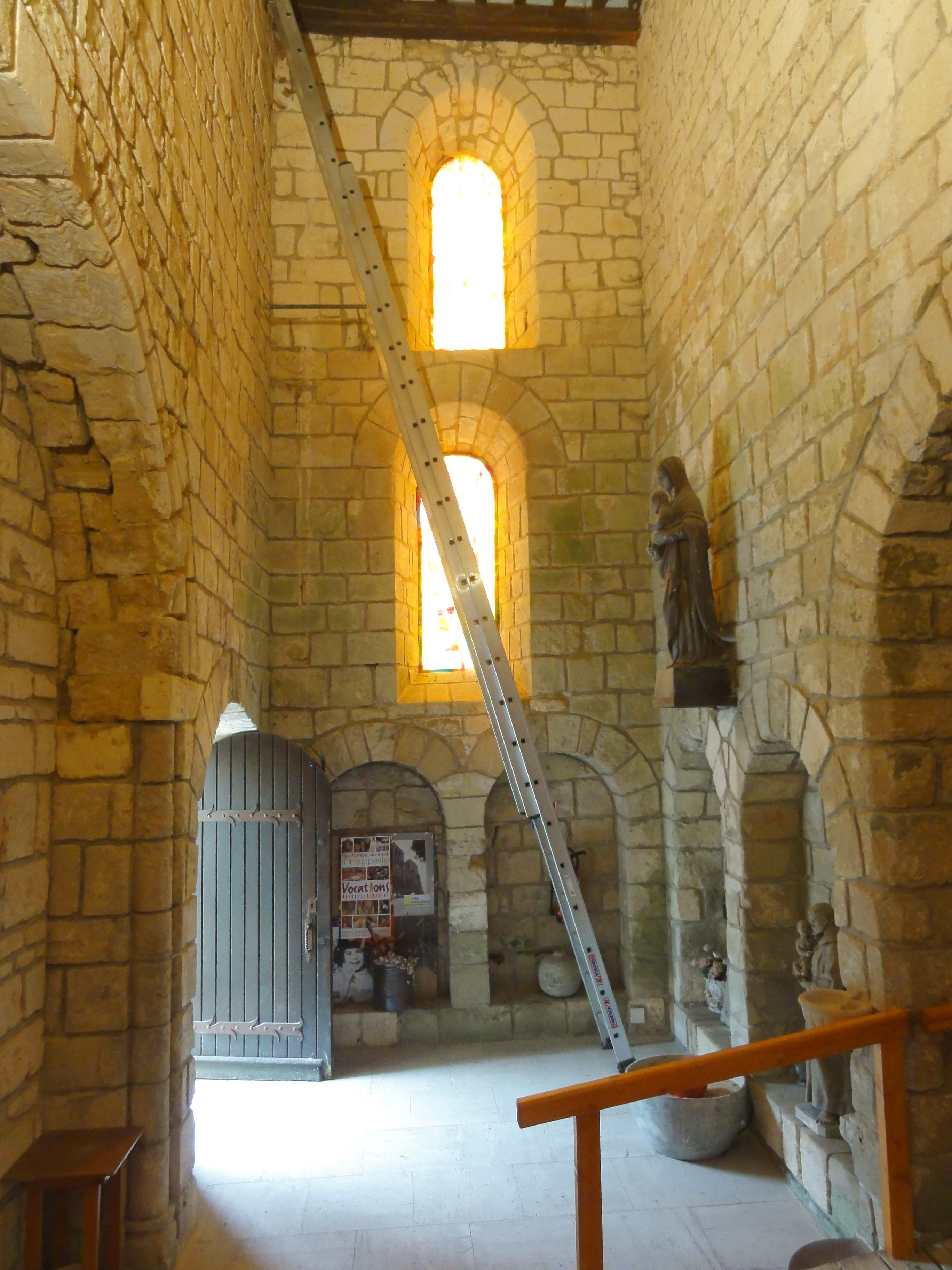 Intérieur de l'église - voir titre.